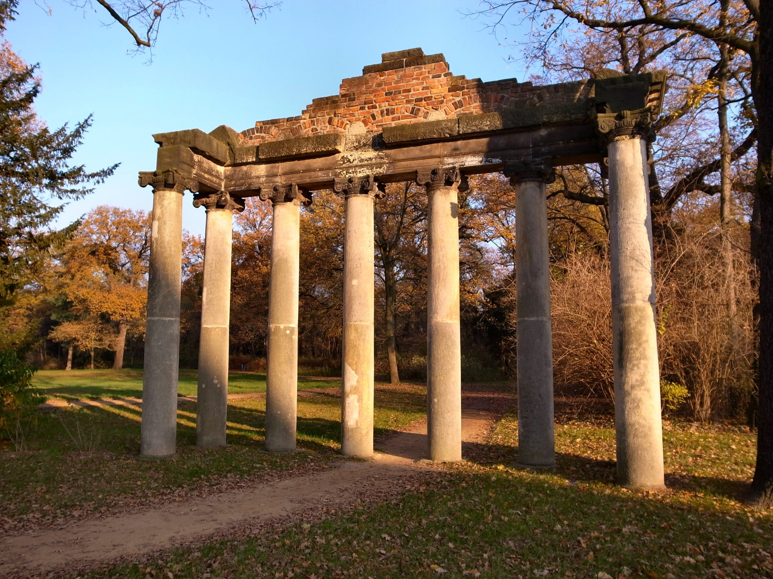 Dessau, Georgium, die Römische Ruine, allgemein als die Sieben Säulen bezeichnet